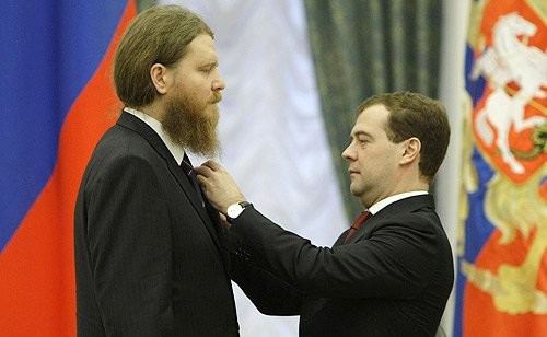 Церемония вручения премий Президента Российской Федерации в области науки и инноваций для молодых учёных за 2008 год. Сергей Кривовичев награждён за фундаментальный вклад в развитие структурной минералогии и кристаллохимии материалов.